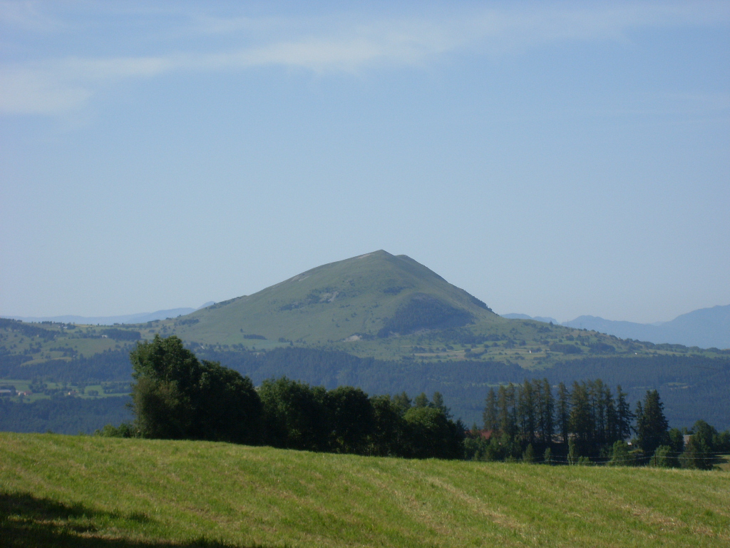 le puy de manse en été 2008